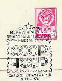 Специальное гашение "Международная филвыставка СССР-ЧССР", Харьков, 1978 год